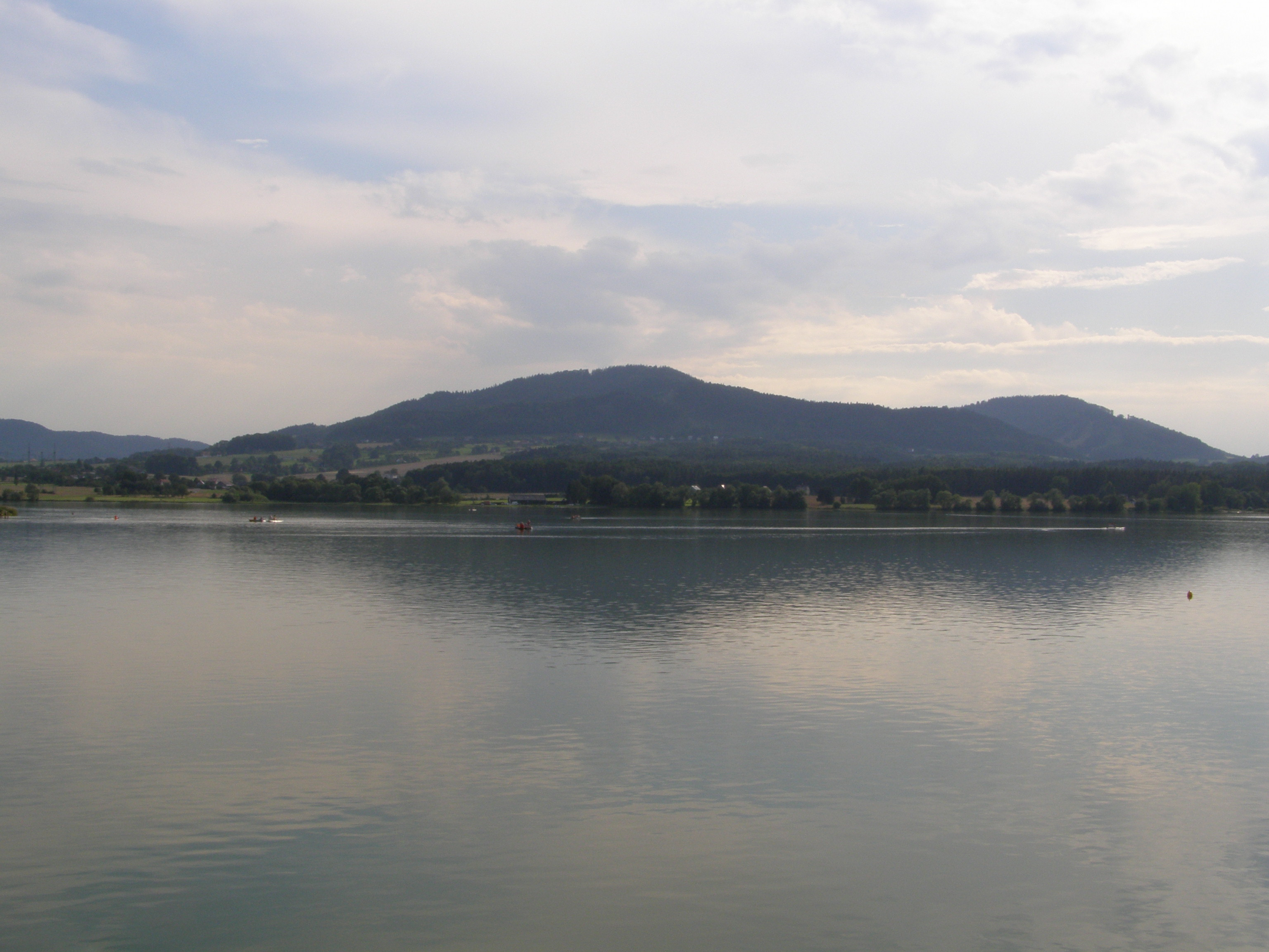 Vodní nádrž Olešná, pohled z hráze, v pozadí Palkovické hůrky